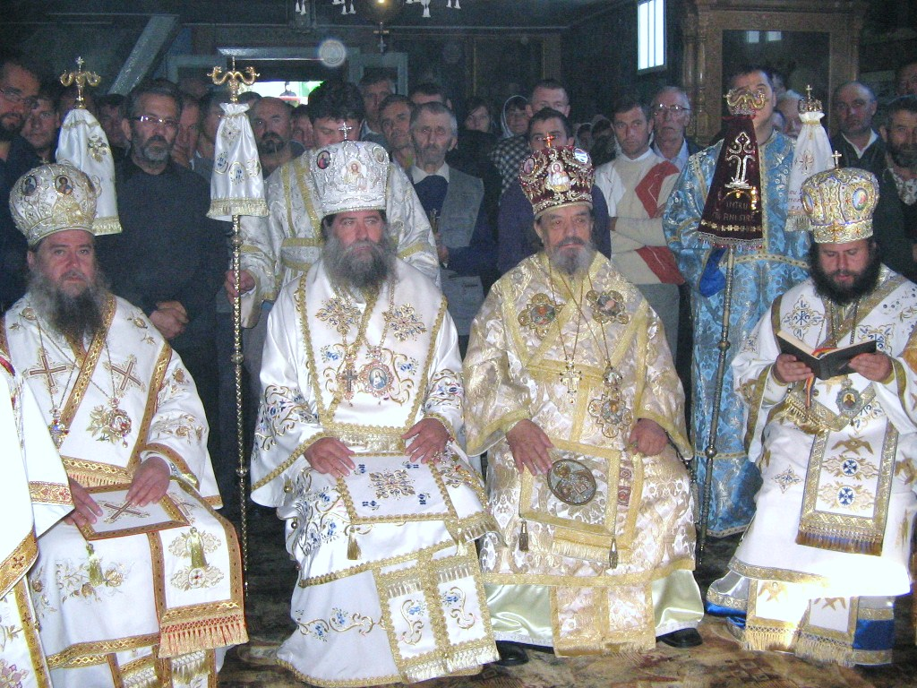 Епископы Румынской старостильной церкви: Гликерий, Софроний, Димосфен, Иосиф